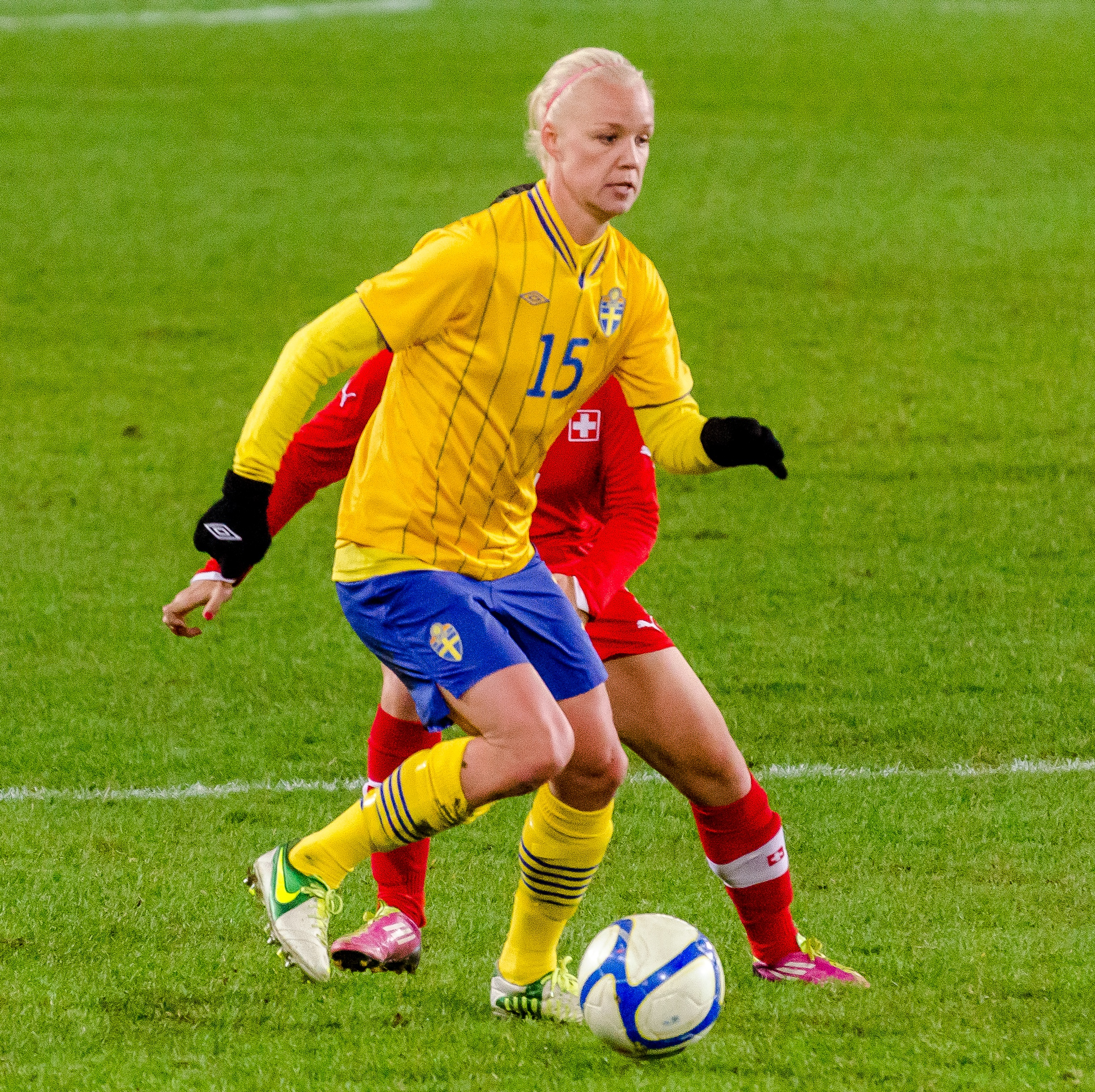 Sveriges Caroline Seger i den första landskampen på Myresjöhus Arena (tillika Pia Sundhages debut som svensk förbundskapten) 23 oktober 2012, där Sverige slog Schweiz med 3-0 inför 4905 åskådare.